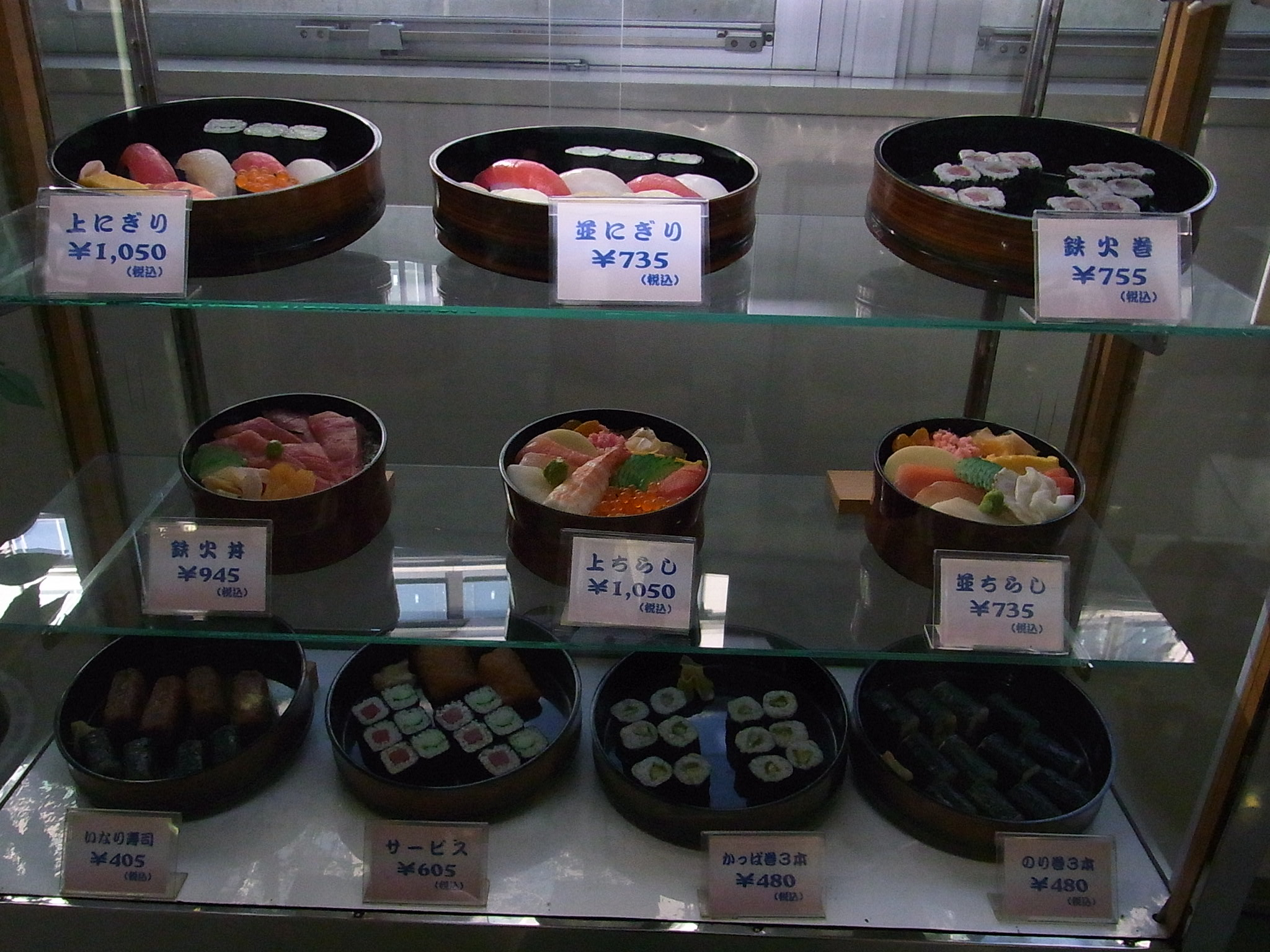 議員食堂（2010年1月18日）